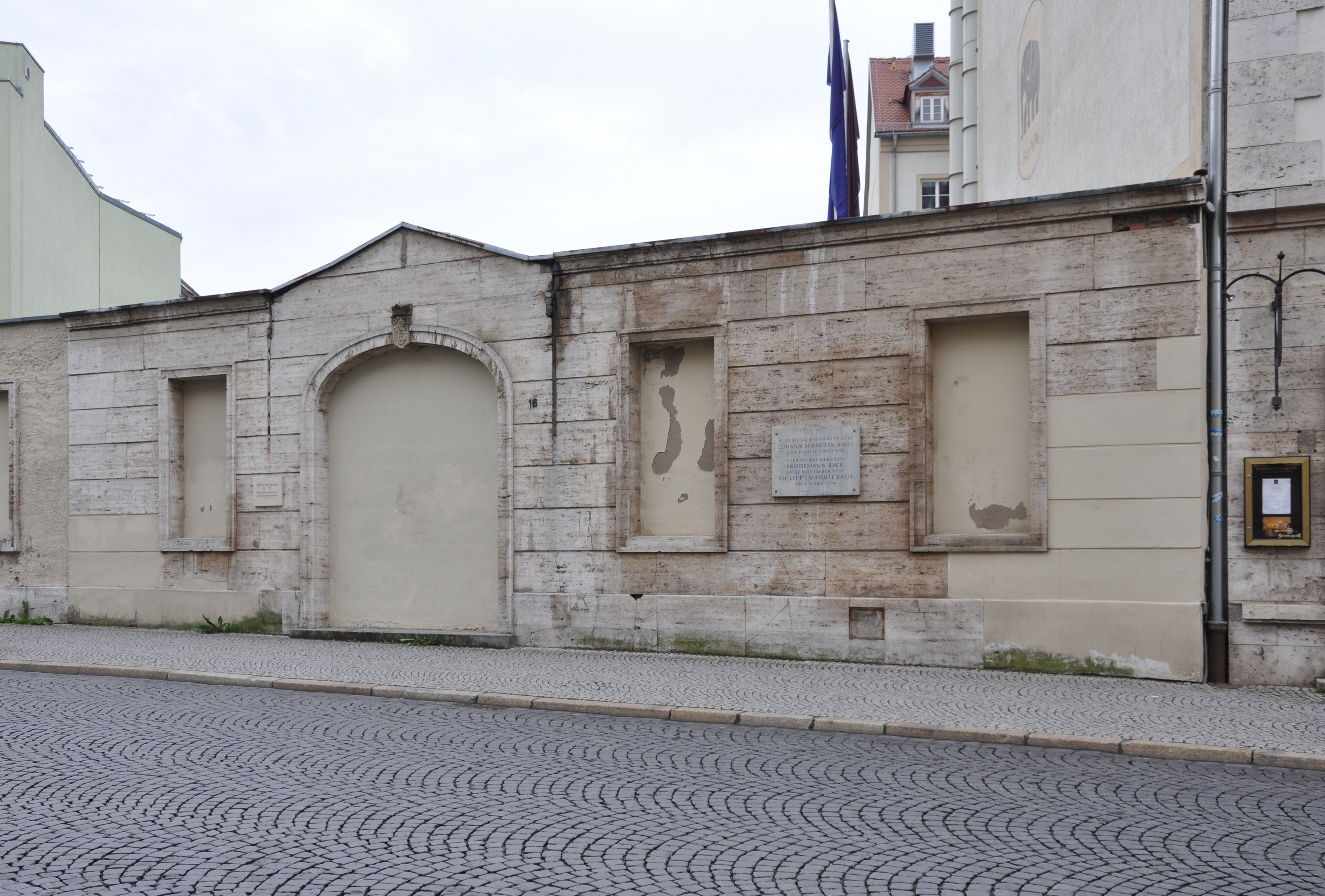 Weimar, Mauer anstelle des Bachhauses Markt 18 mit Gedenktafel